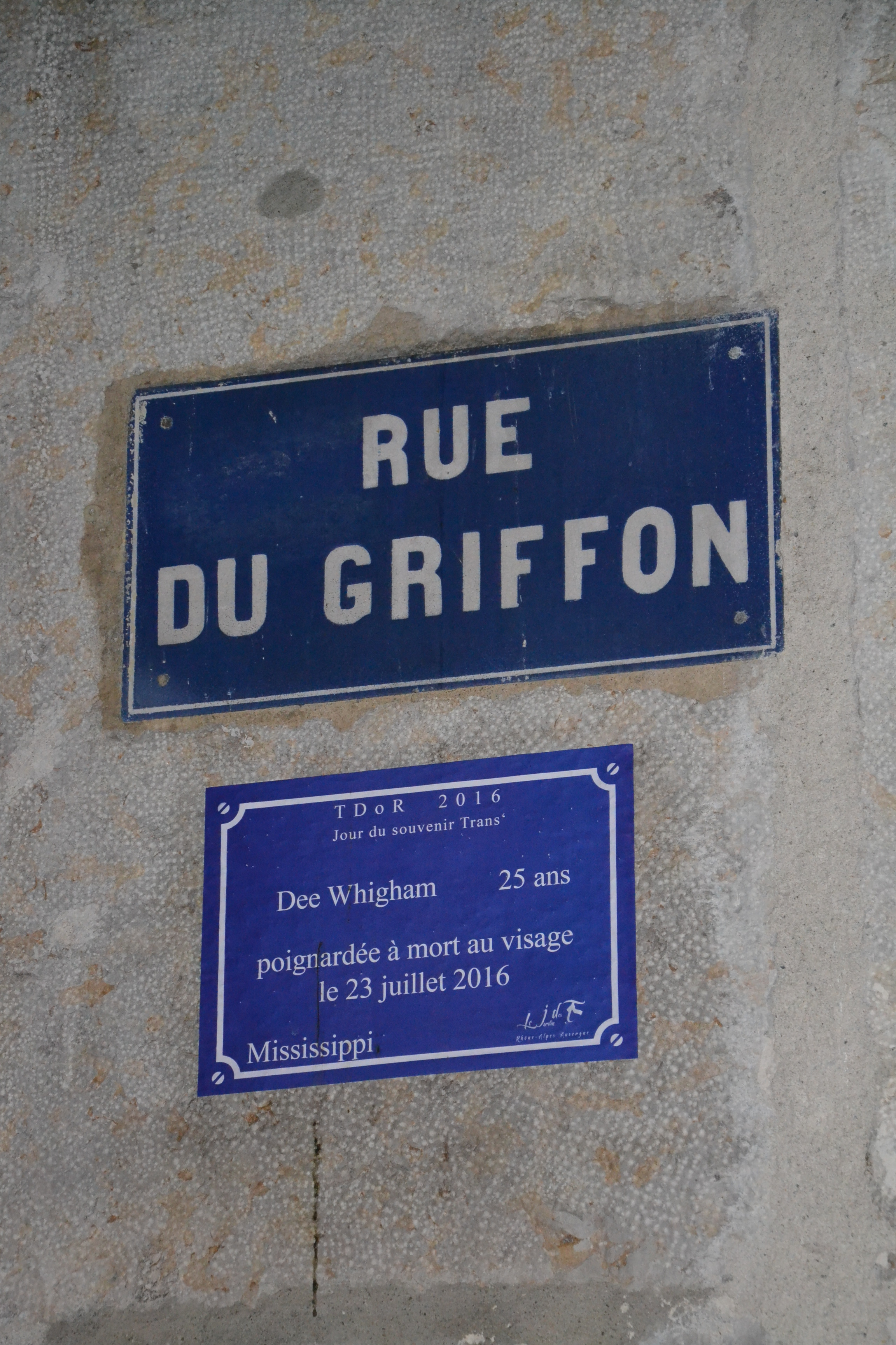 Fausse plaque de rue posée lors du Jour du Souvenir Trans 2016, à Lyon (Rhône, France).